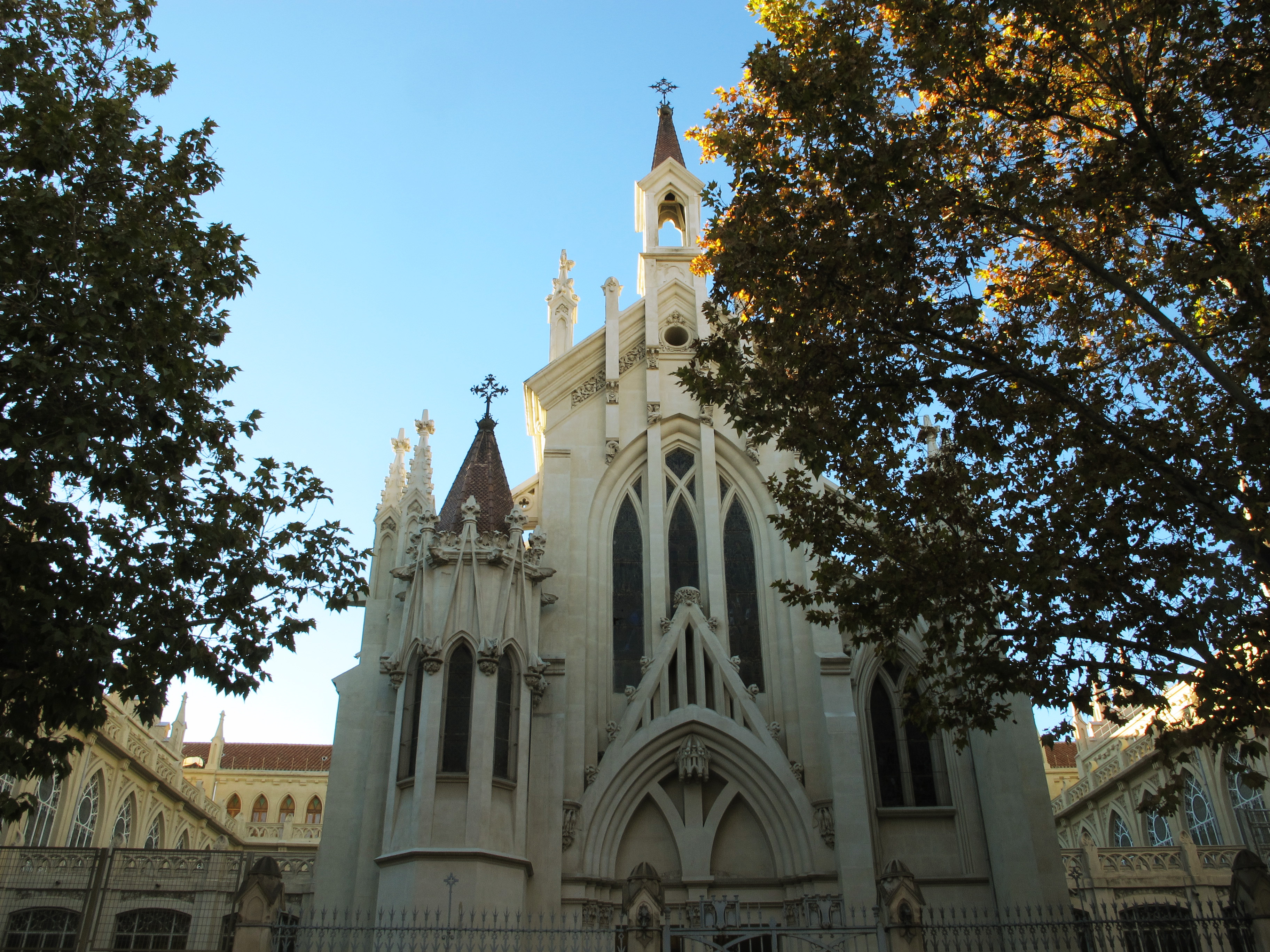 El Colegio del Pilar fue fundado el 3 de octubre de 1907, por el creciente número de alumnos, la orden adquirió en 1921 (con ayuda económica de los marianistas de Estados Unidos) el edificio que ocupa actualmente. Desde la década de 1920, pasó a ser uno de los grandes colegios madrileños.Con una notable proporción de políticos españoles de todas las tendencias pasaron y pasan por sus aulas. La frase del Evangelio de San Juan «La verdad os hará libres» se ha convertido en su lema Esta foto participa en el juego En un lugar de Flickr